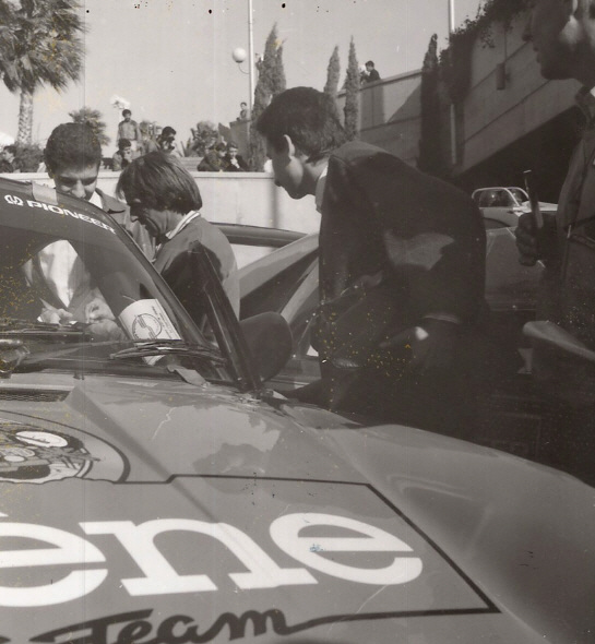 Champion automobile